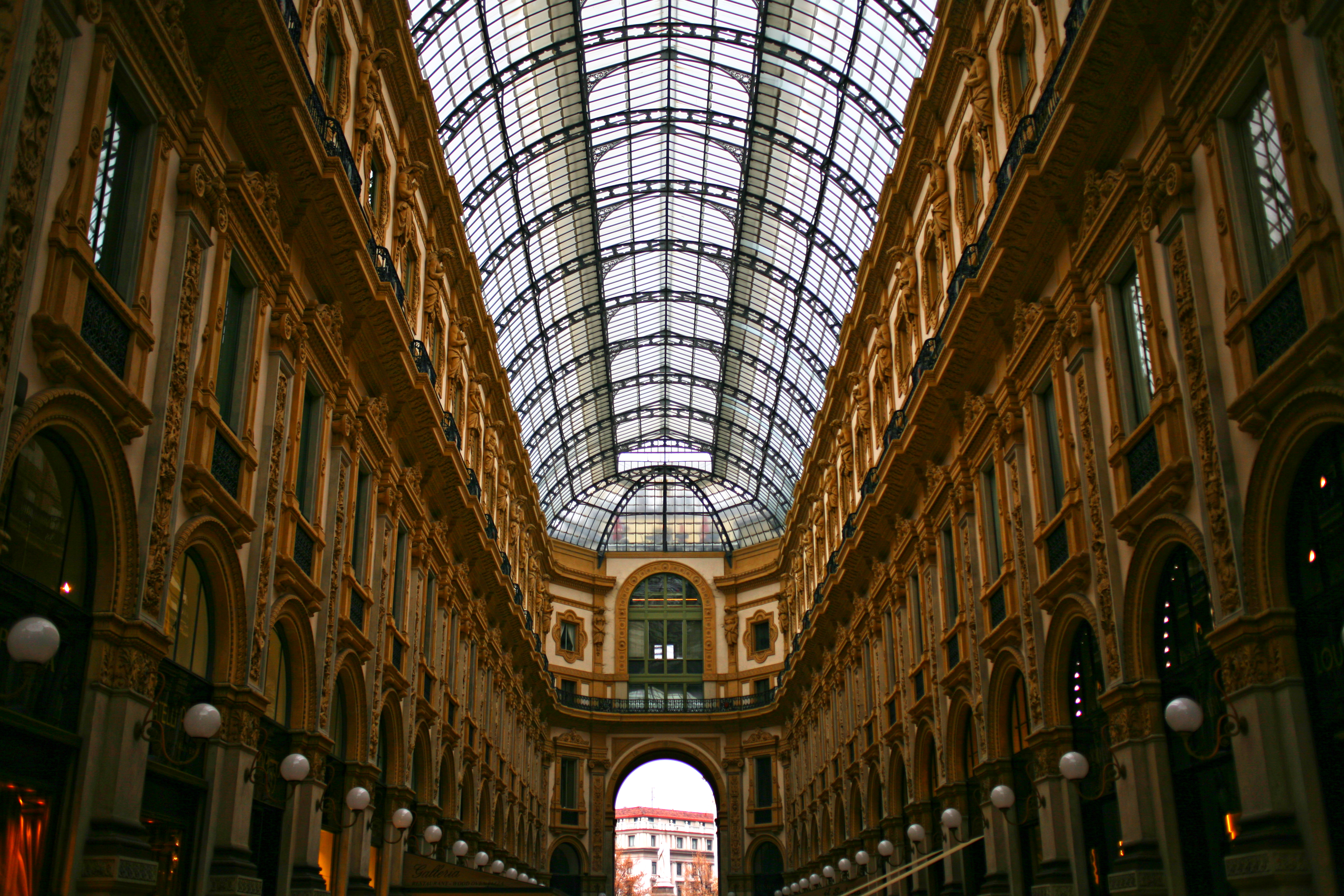 Galleria di Milano, uscita verso piazza della Scala